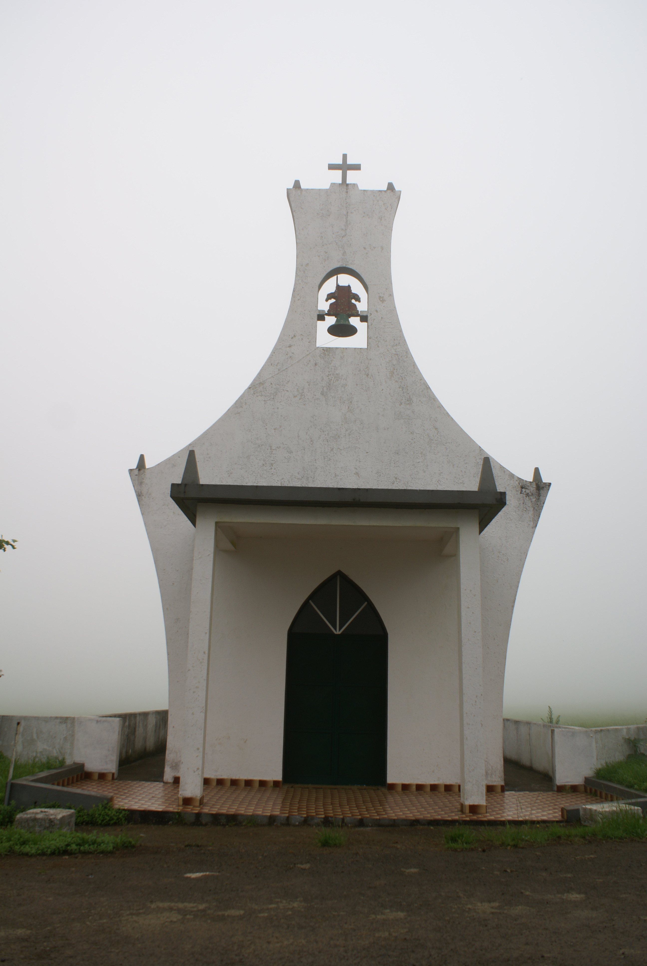 Ermida de Santo Antão, Parque do Terreiro da Macela, ilha de São Jorge, Açores